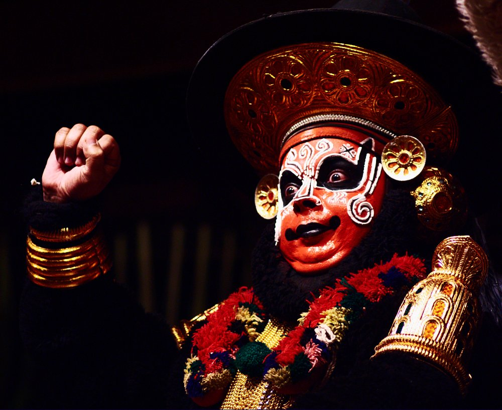 കൂടിയാട്ടത്തിലെസുഗ്രീവൻ